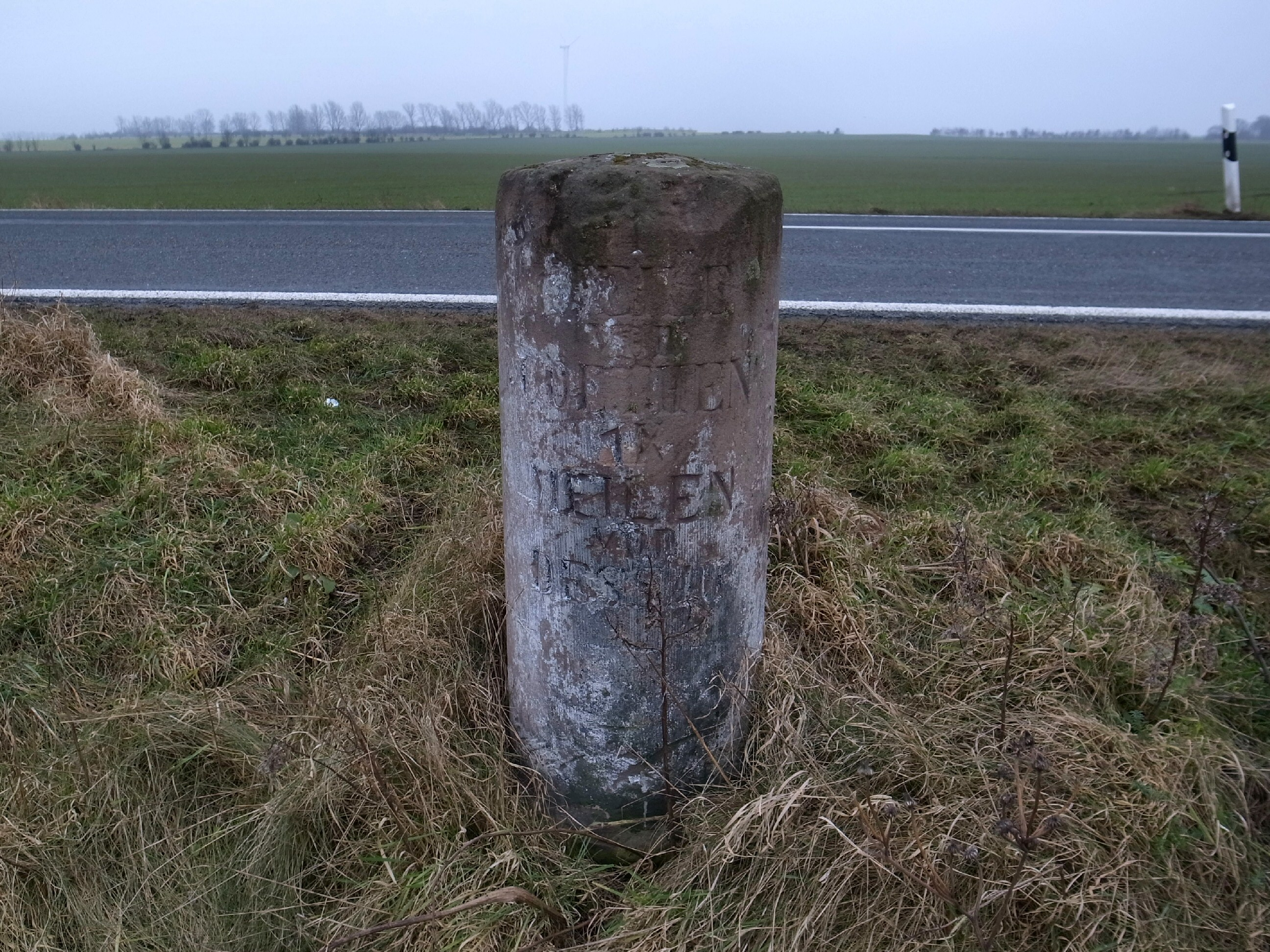 Dohndorf / Gerlebogk, Meilenstein, Anhaltischer Rundsockelstein